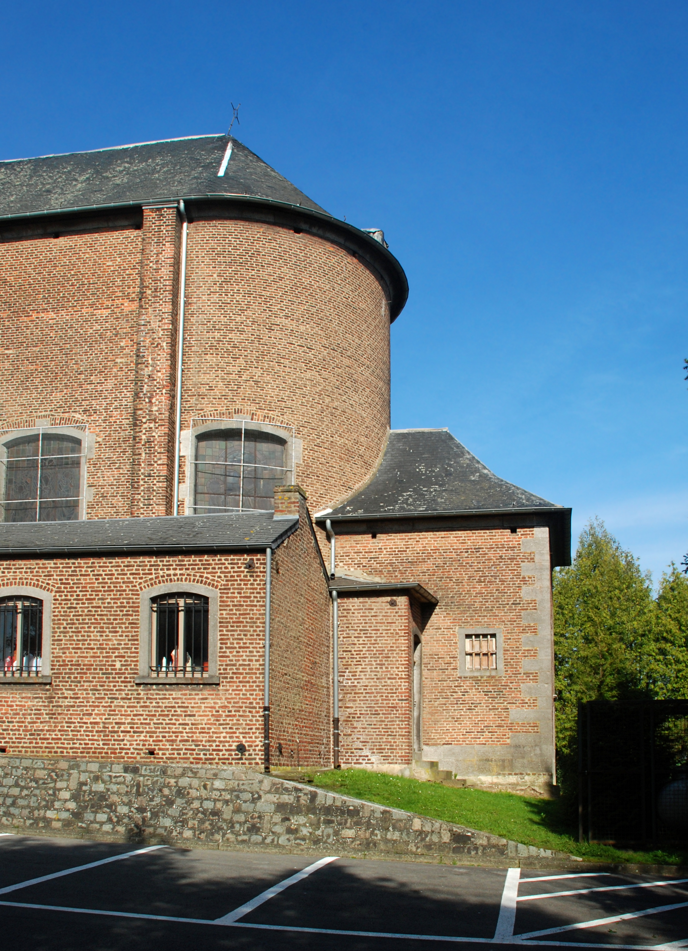 Belgique - Brabant wallon - Genappe - Baisy-Thy - Église Saint-Hubert